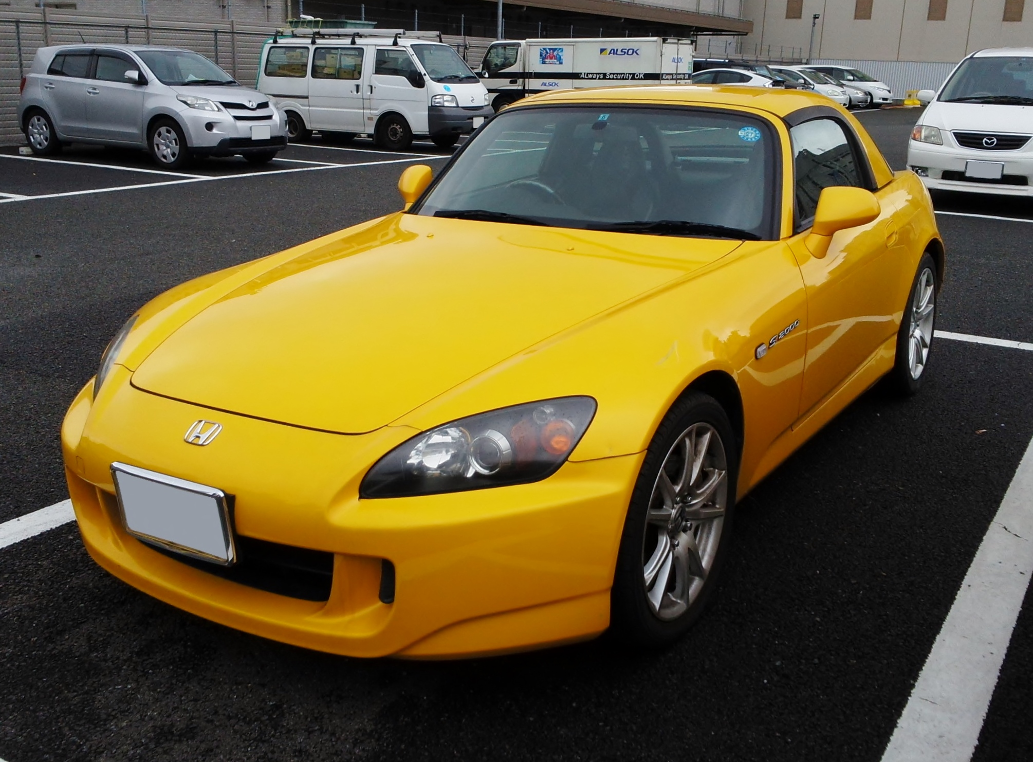 ハードトップ装着のAP2型ホンダ・S2000タイプVをフロントから撮影。